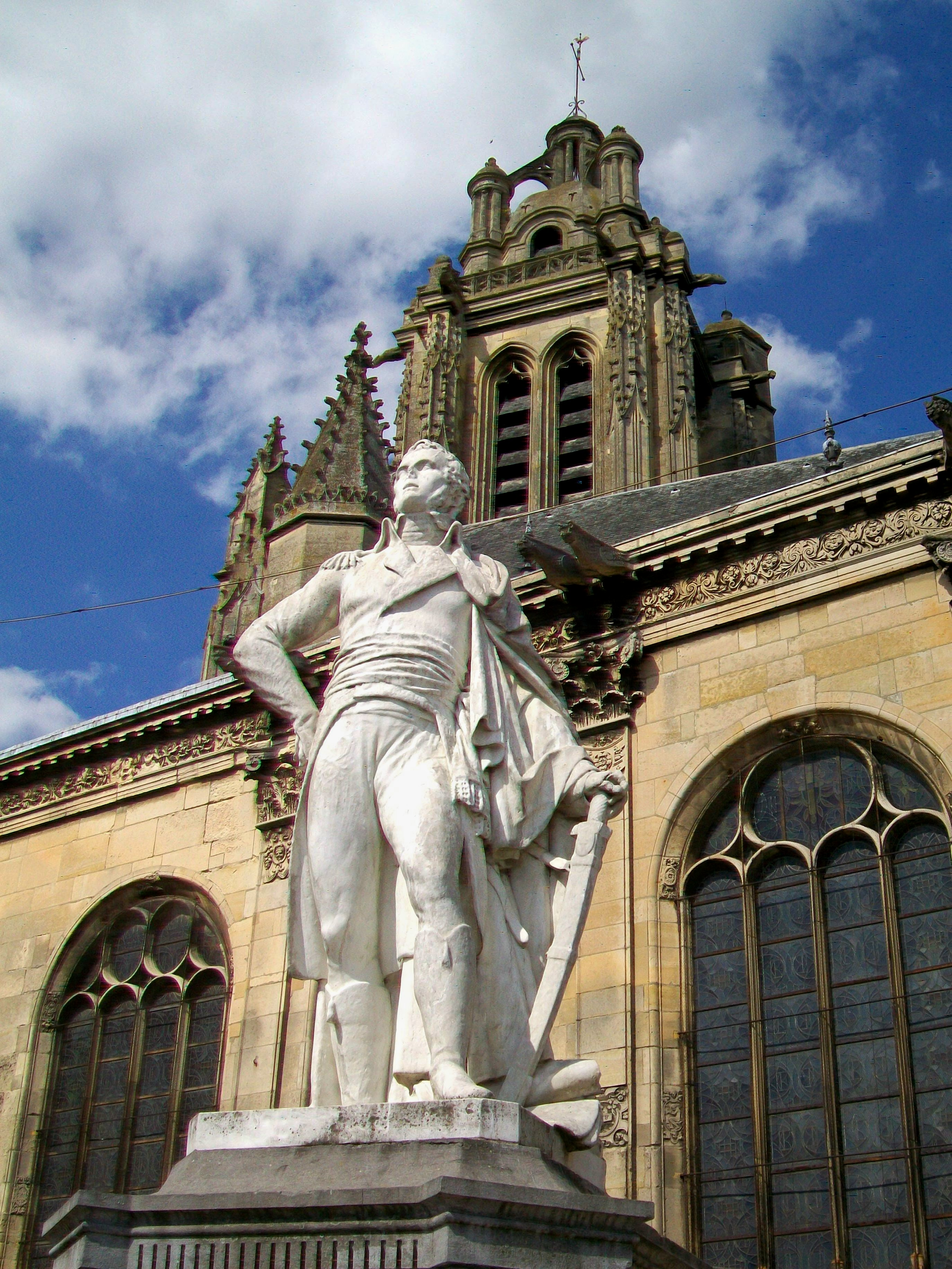 La statue du général Charles Victoire Emmanuel Leclerc (1772-1802), natif de Pontoise, en haut de l'escalier de la rue Thiers, au sud de la cathédrale Saint-Macloud ; œuvre du sculpteur François Lemot de 1869.